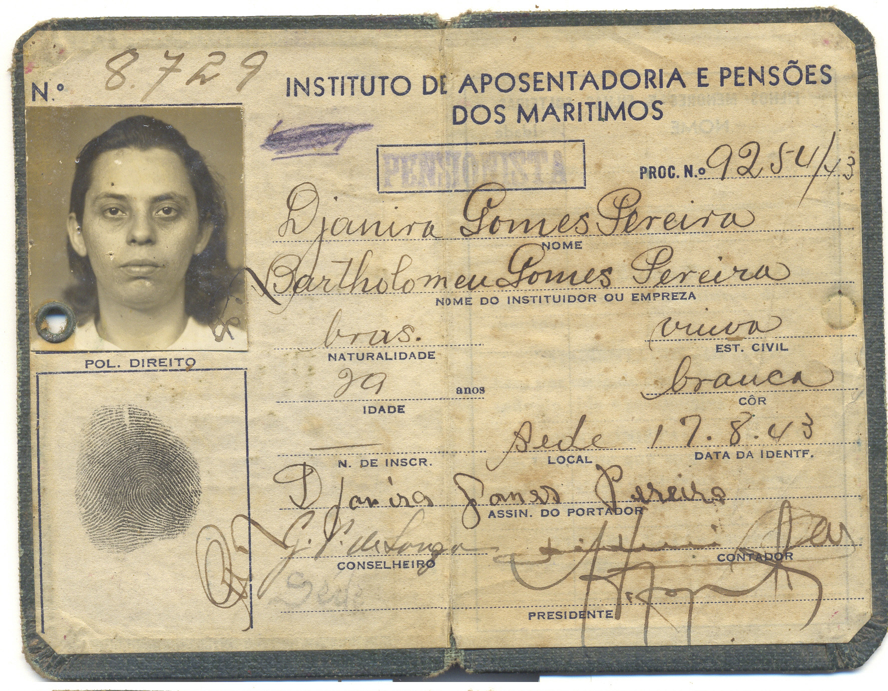 Carteira identidade de pensionista da pintora Djanira. Foto do acervo do museu municipal de Avaré.